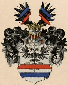 Zoege von Manteuffeli suguvõsa aadlivapp